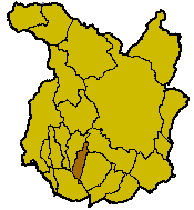 Localisation de la commune de Pieve a Nievole à l'intérieur de la province de Pistoia.